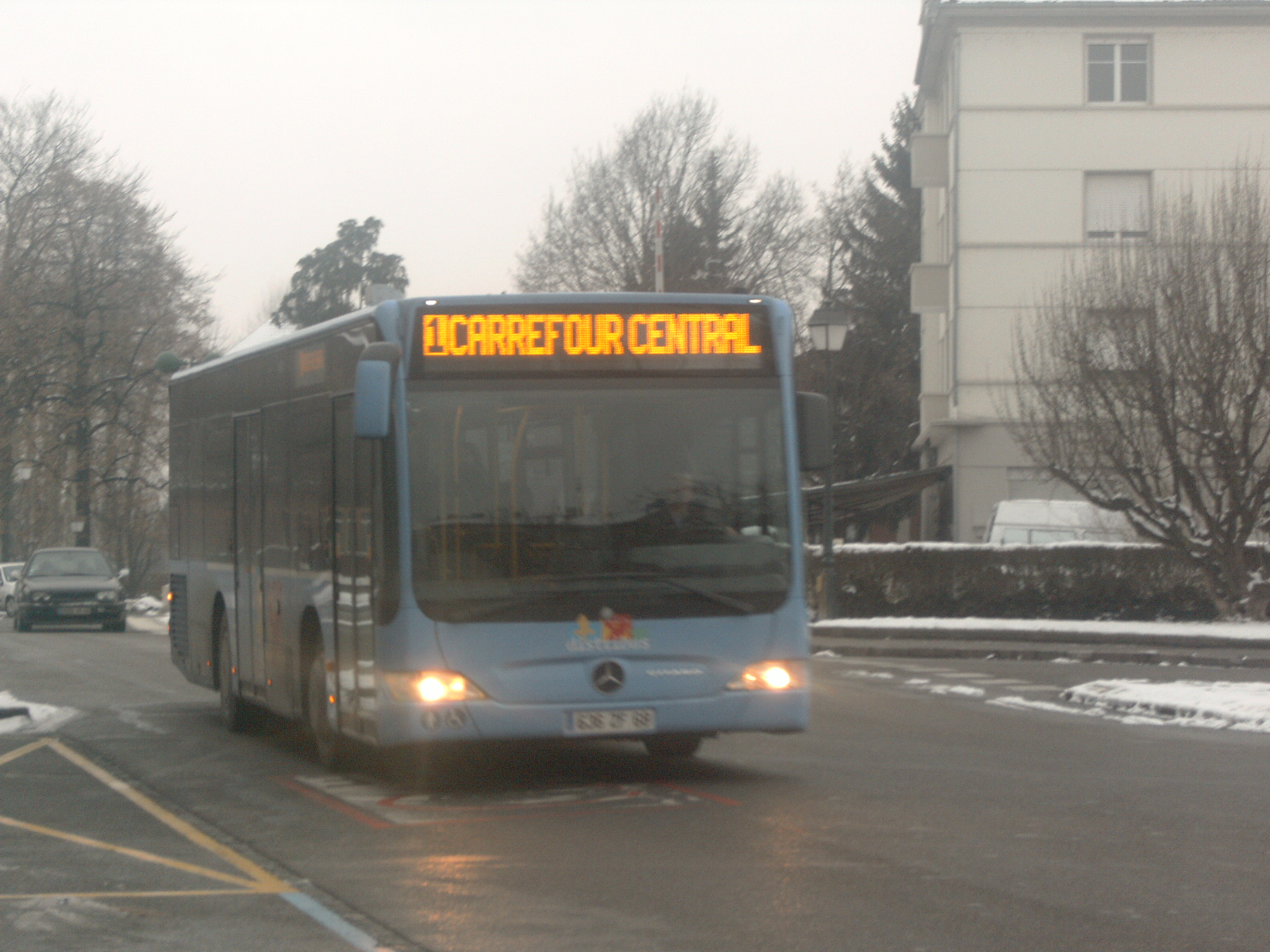 Citaro K de Distribus à Huningue. Ligne 1 en terminus au Carrefour Central.